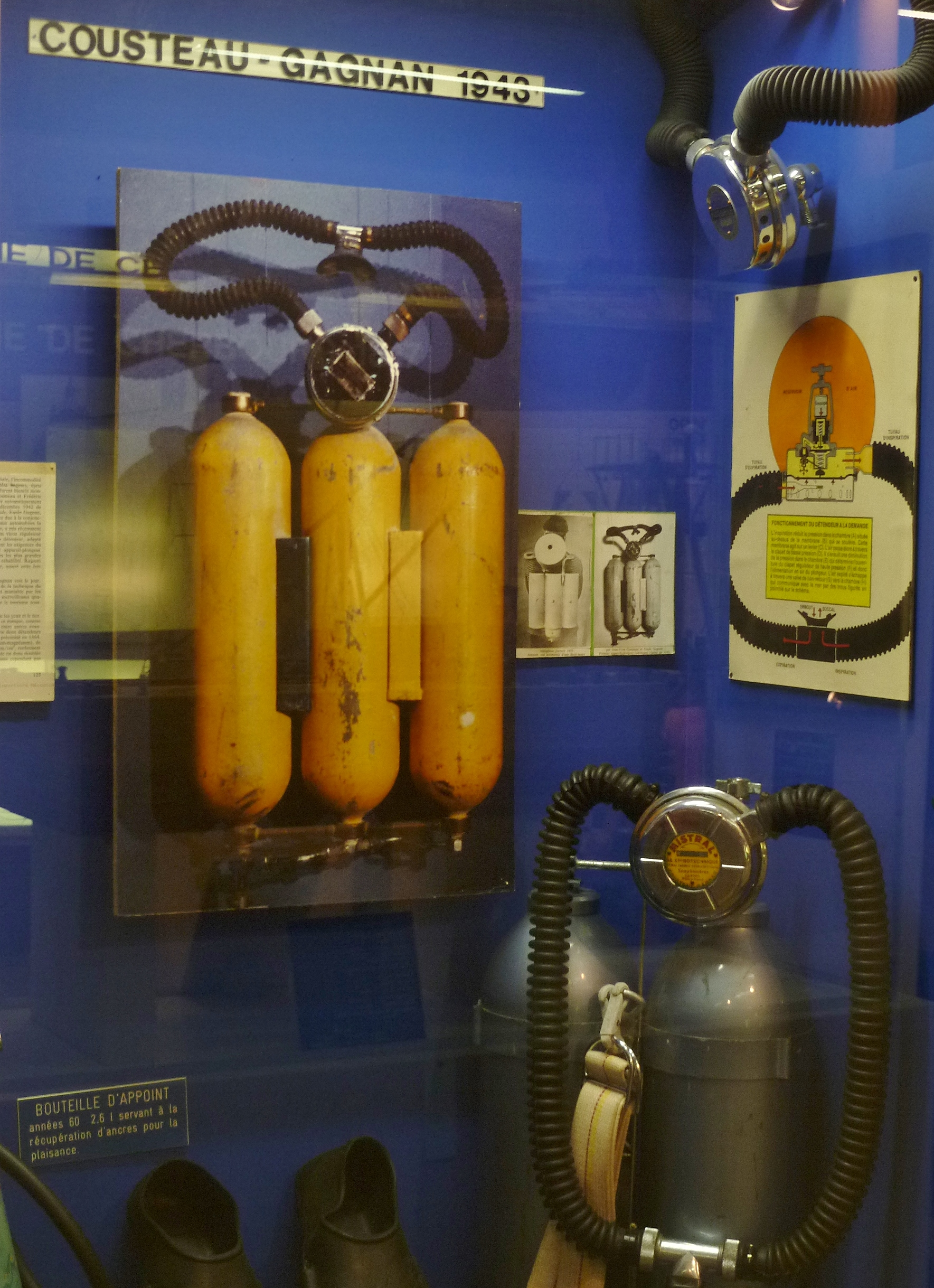 Invention du détendeur du scaphrandre autonome par Jacques-Yves Cousteau et Émile Gagnan; Musée du Scaphandre; Espalion, dept. Aveyron, France